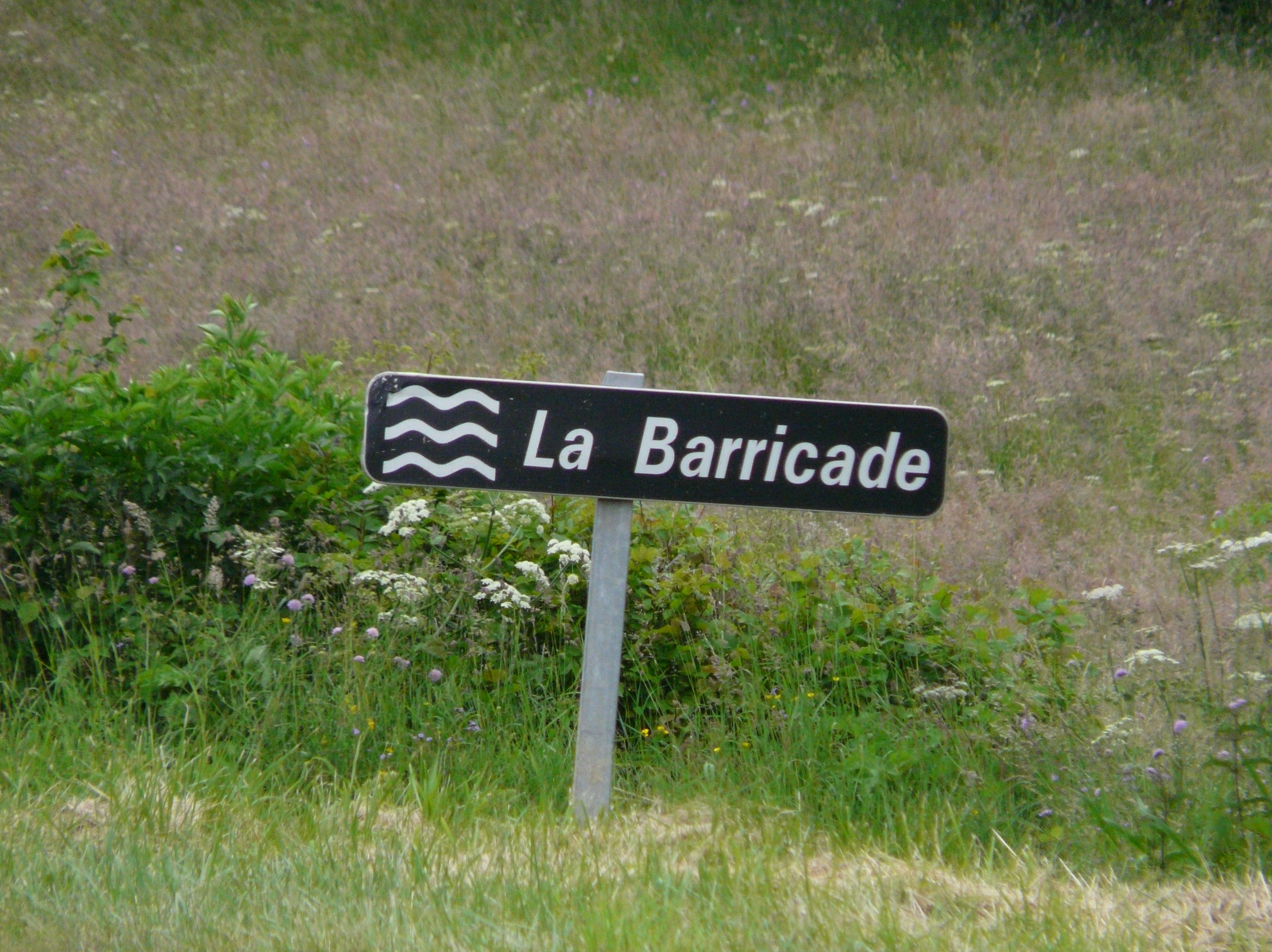 Panneau induquant le ruisseau de la Barricade au niveau de la route départementale 1089, Aix, Corrèze, France.